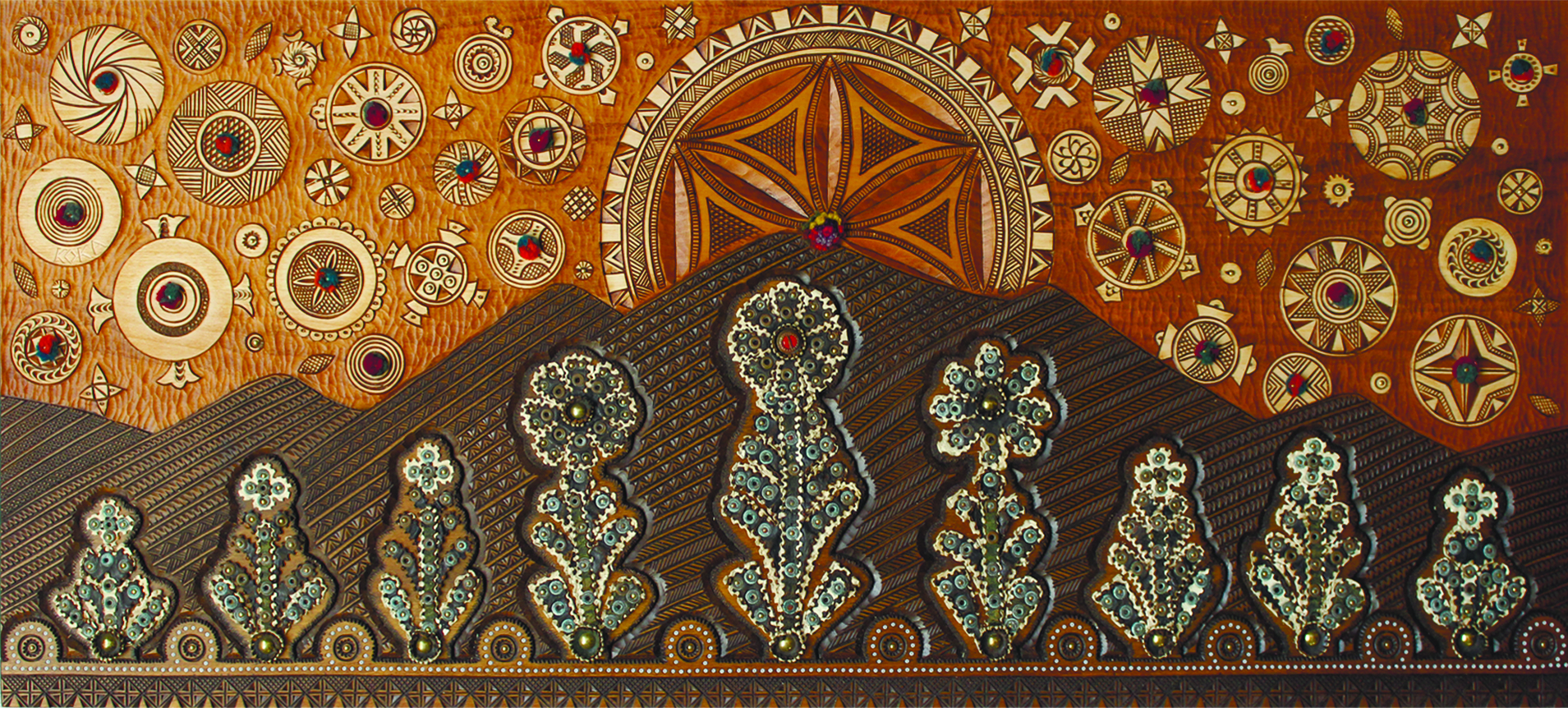 Plast 2